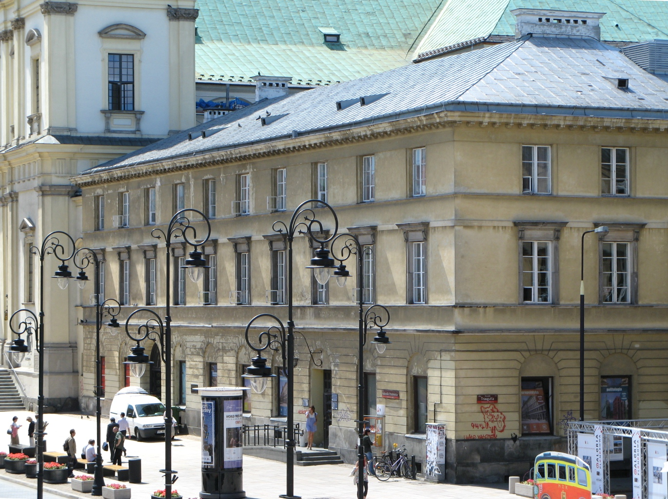 Wydział Filozofii i Socjologii Uniwersytetu Warszawskiego